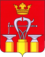 Герб Александровского района Владимирской области